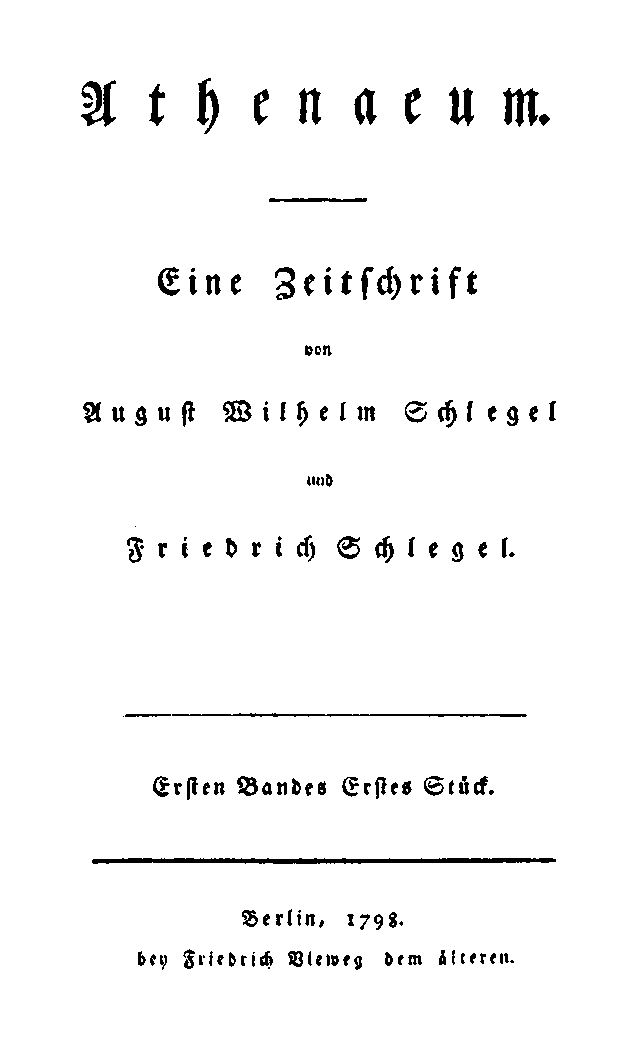 Titelseite der Zeitschrift / Title page of the periodical